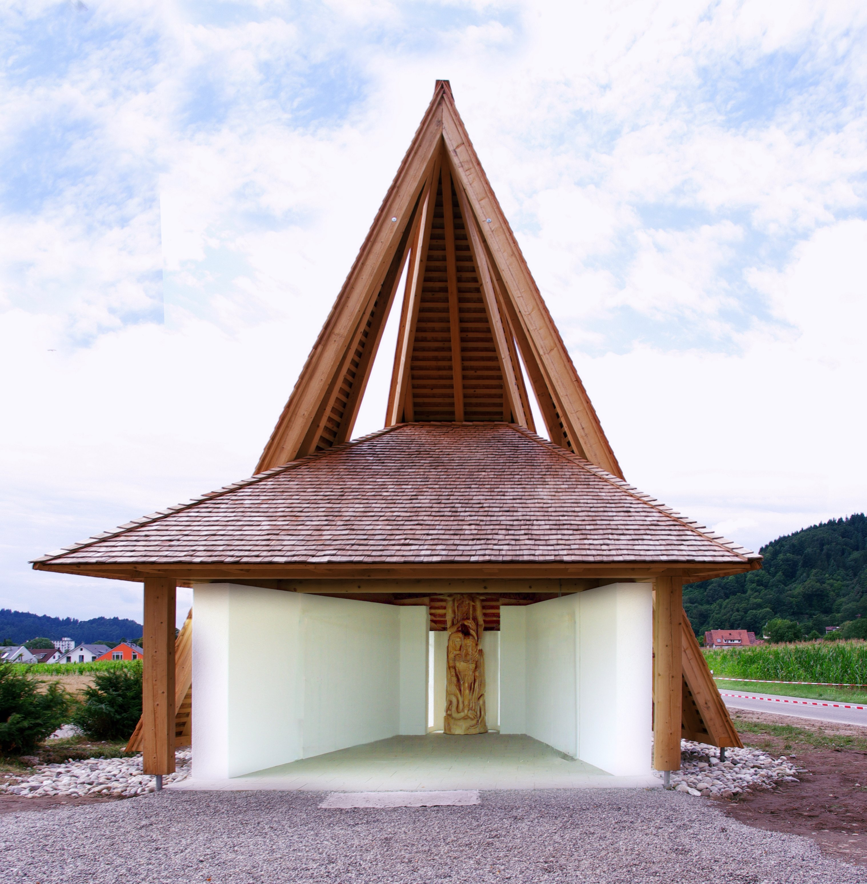 Anna Kapelle Ebnet Blick in den Innenraum der offenen Kapelle